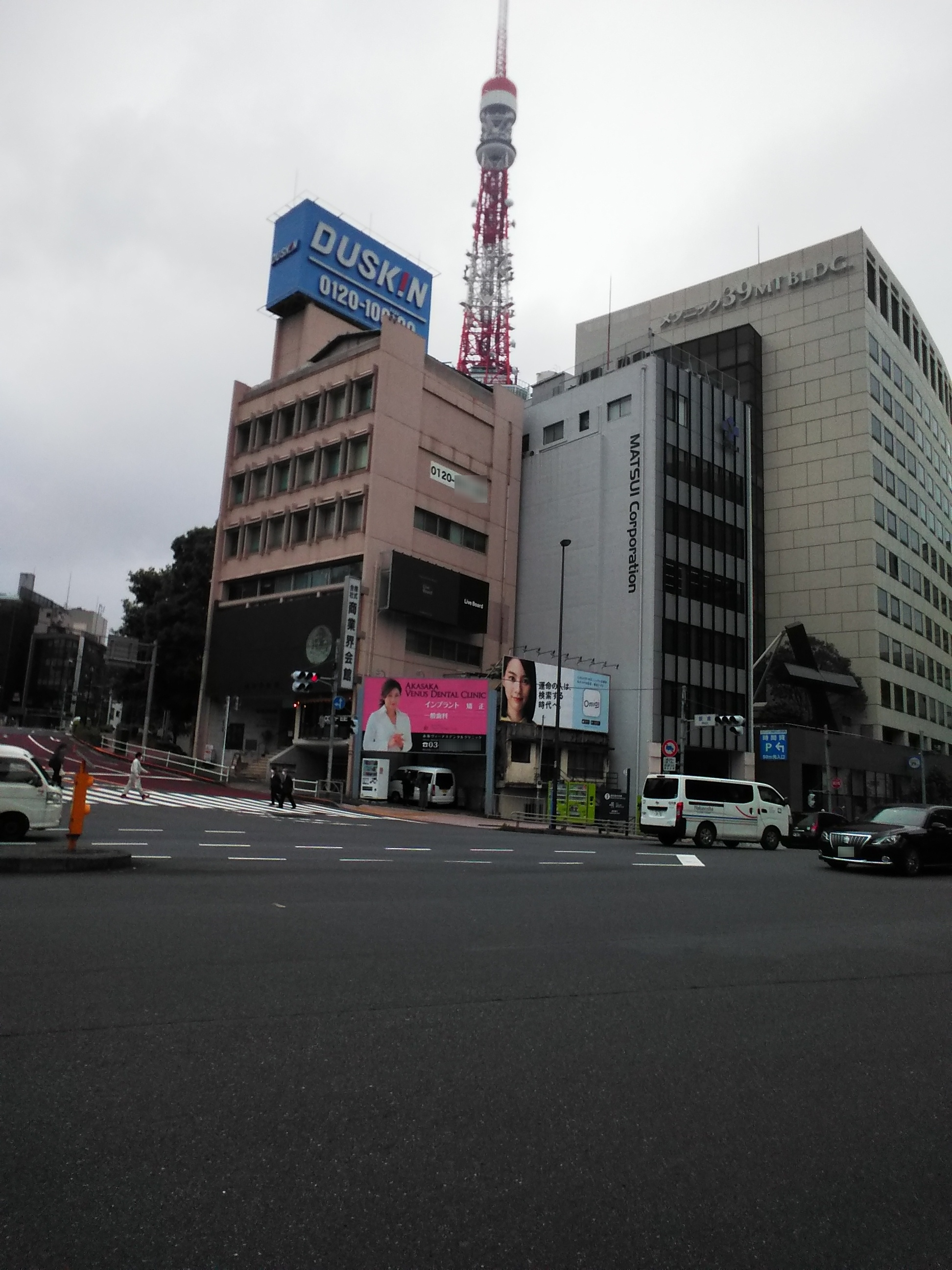 東京都港区麻布台。出版社商業界が入っていた商業界会館ビル。